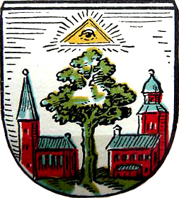 Herb wsi Goszcz, gmina Twardogóra.